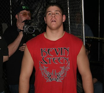 Kevin Steen image taken by myself